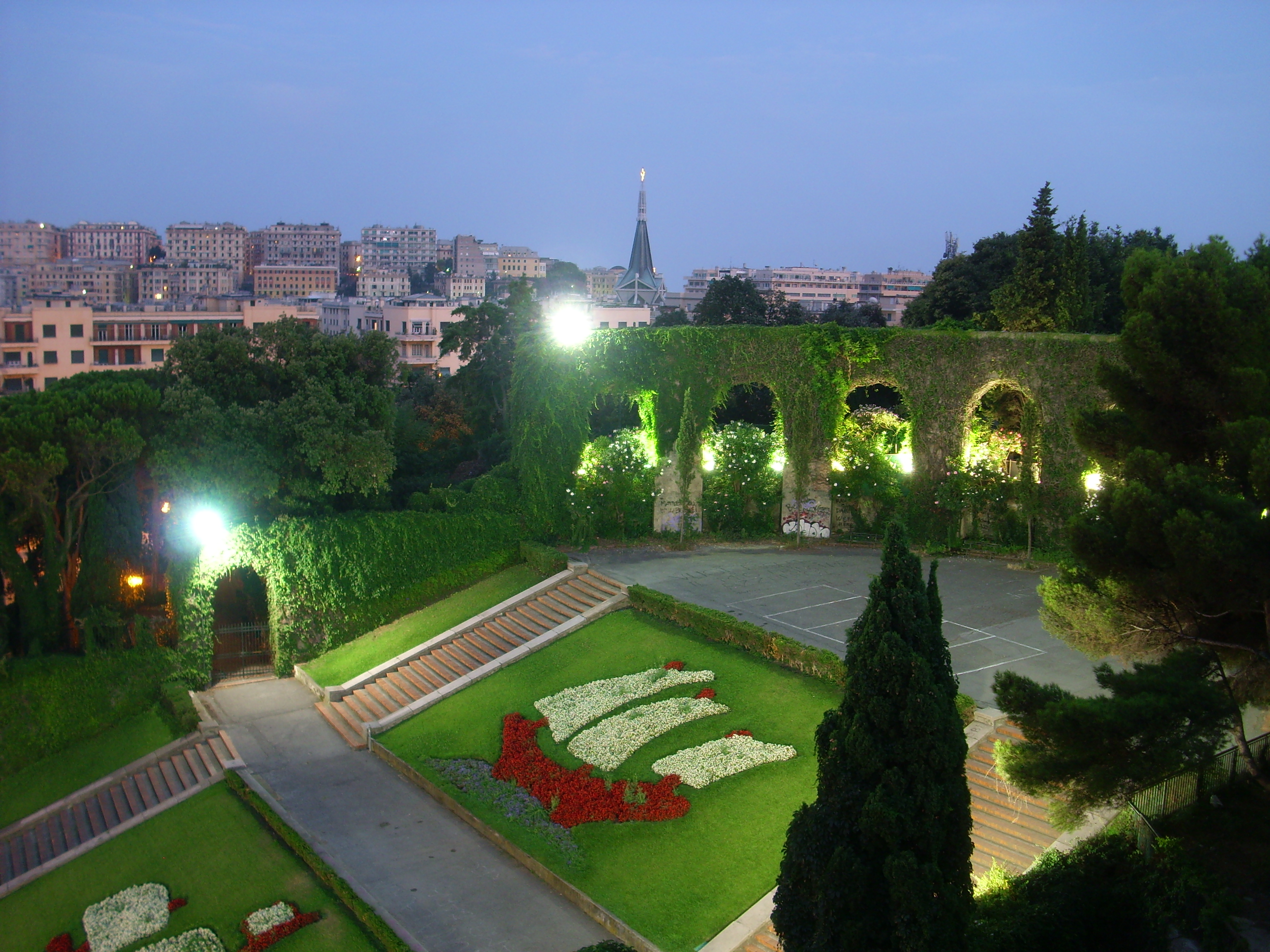 La scalinata delle caravelle a Genova, fotografata al crepuscolo.